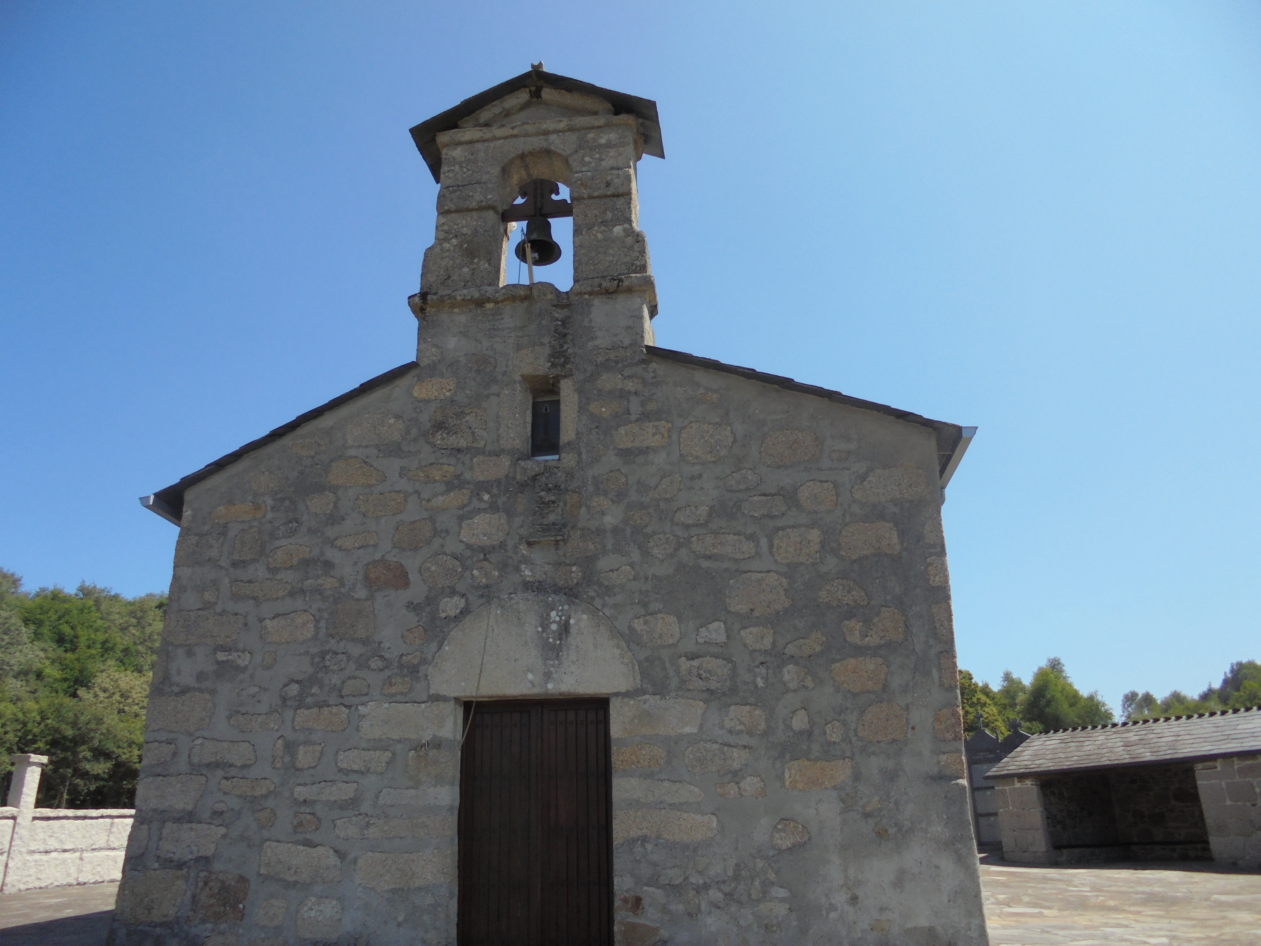 Igrexa parroquial de Mazoi (Lugo)